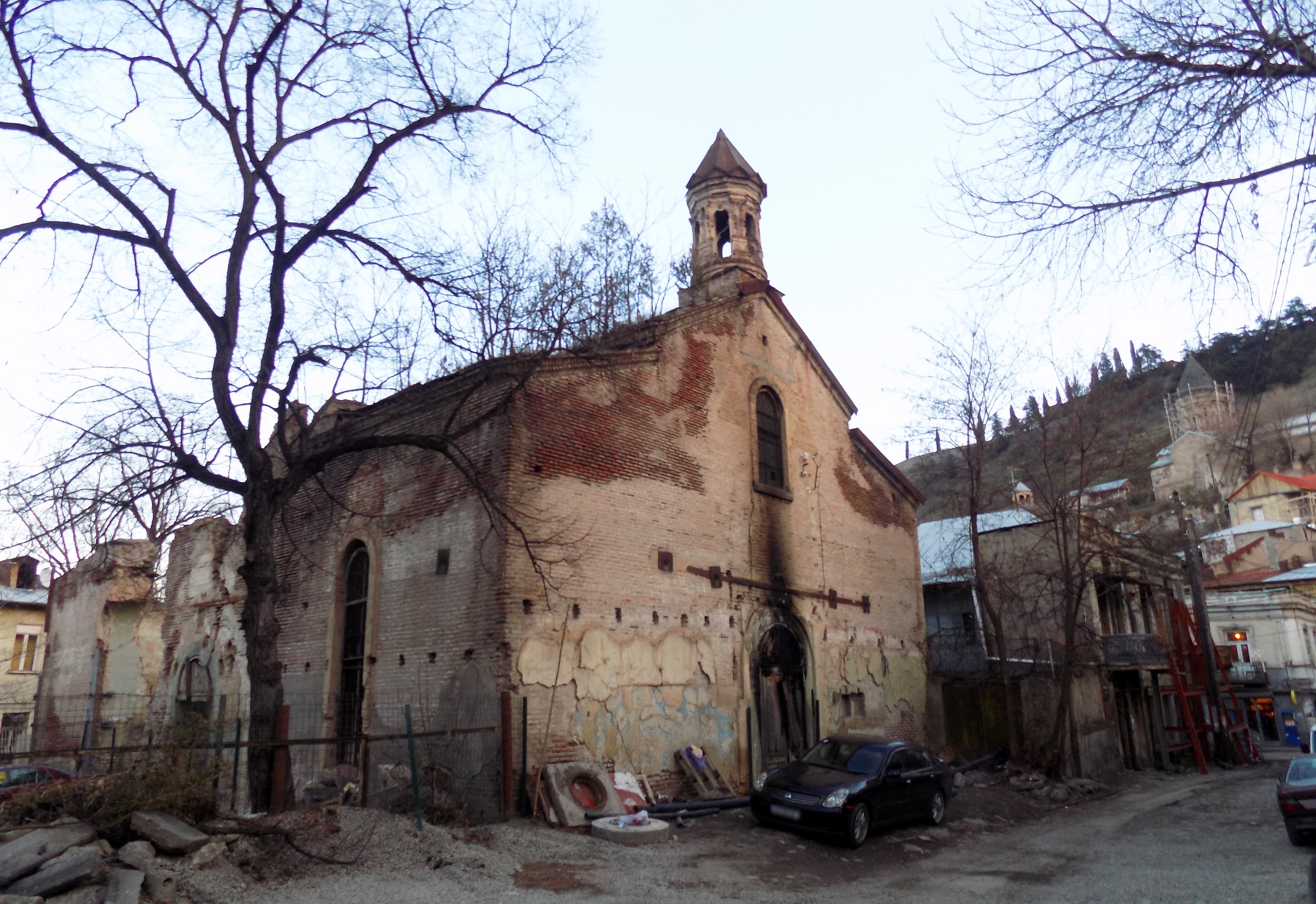 „მოღნისი“